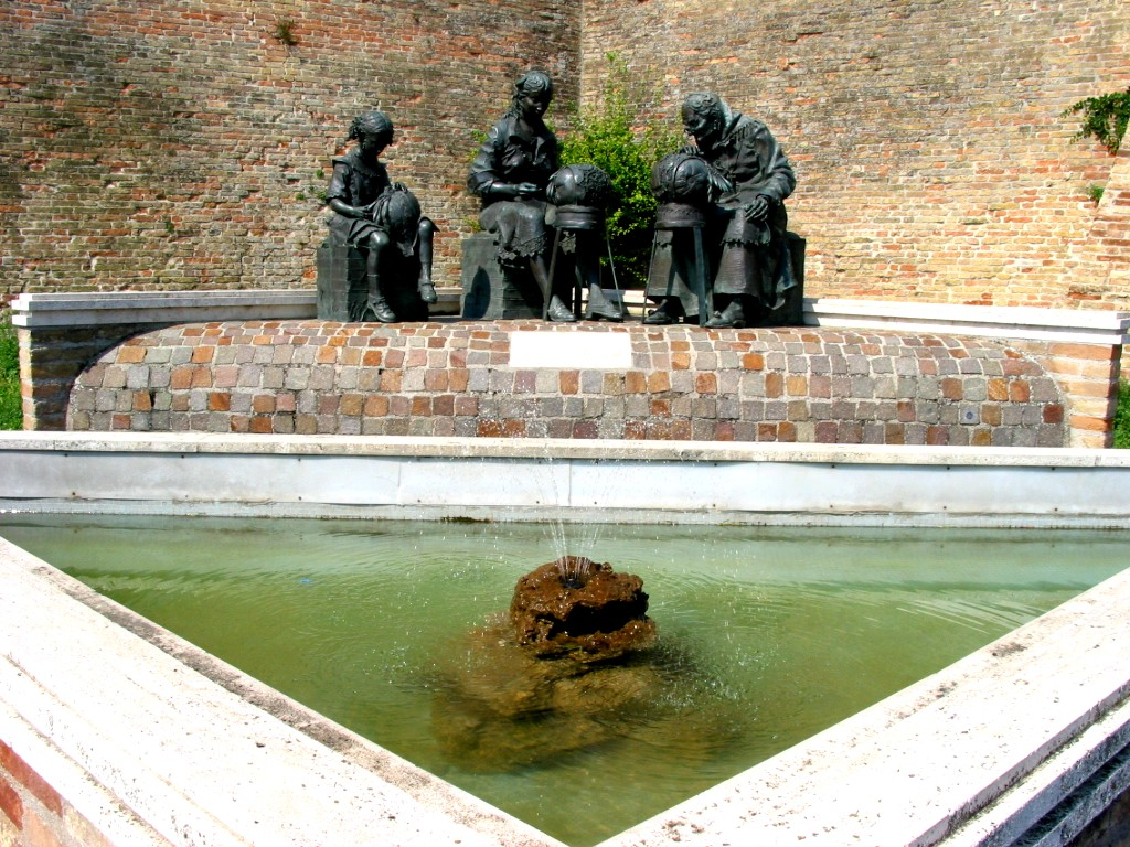 Monumento alle merlettaie. Offida, Marche, Italia2.8.2002 Offida Marche, Lacework